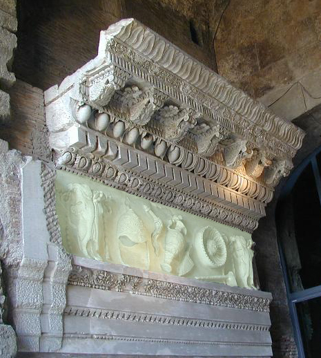 Fregio (evidenziato in verde) della trabeazione del Tempio di Vespasiano nel Foro Romano, ricomposta con frammenti originali nel Tabularium a Roma (Musei Capitolini).